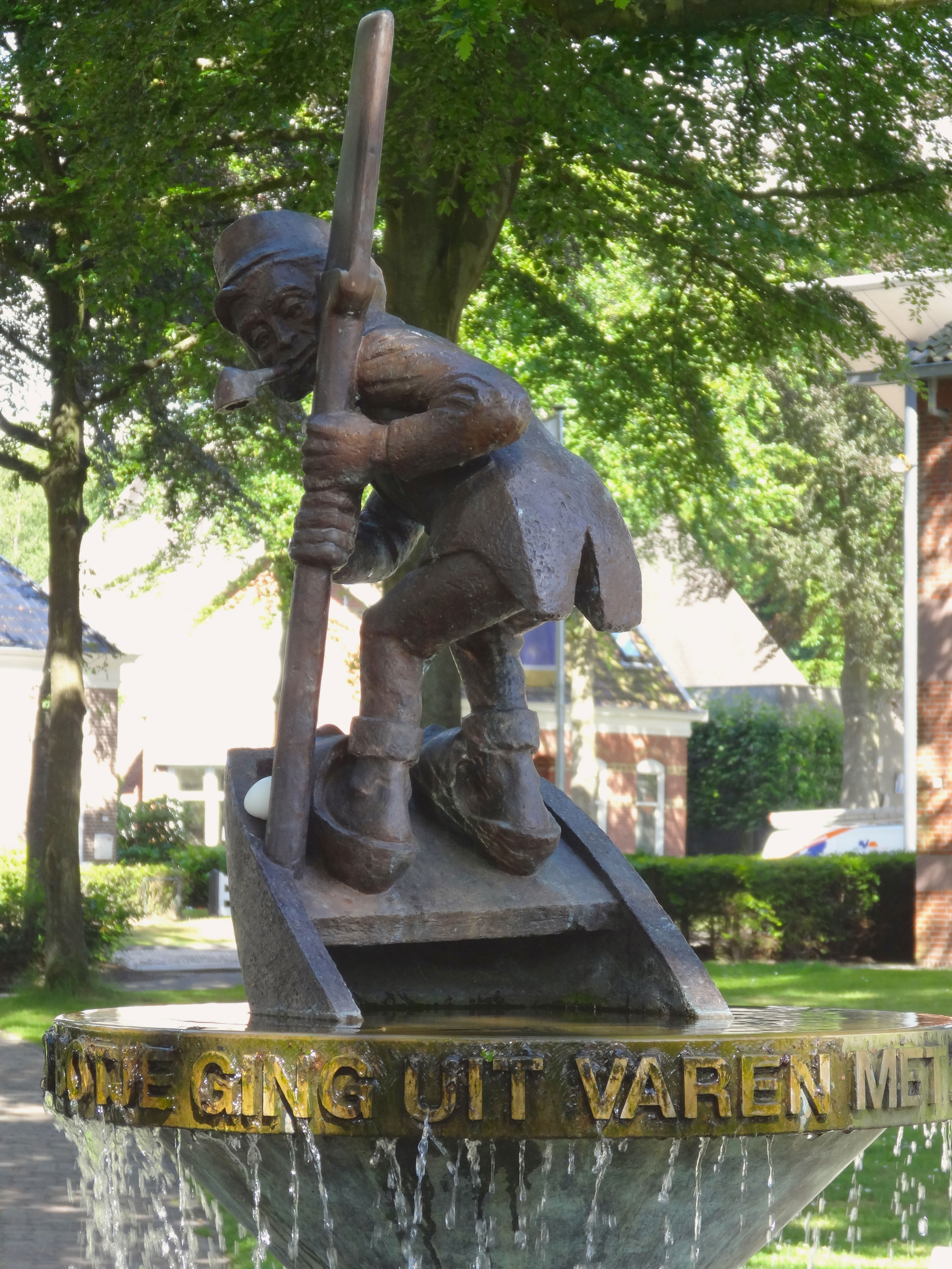 Bronzen replica van het beeld van Berend Botje van Willy Pot in Zuidlaren